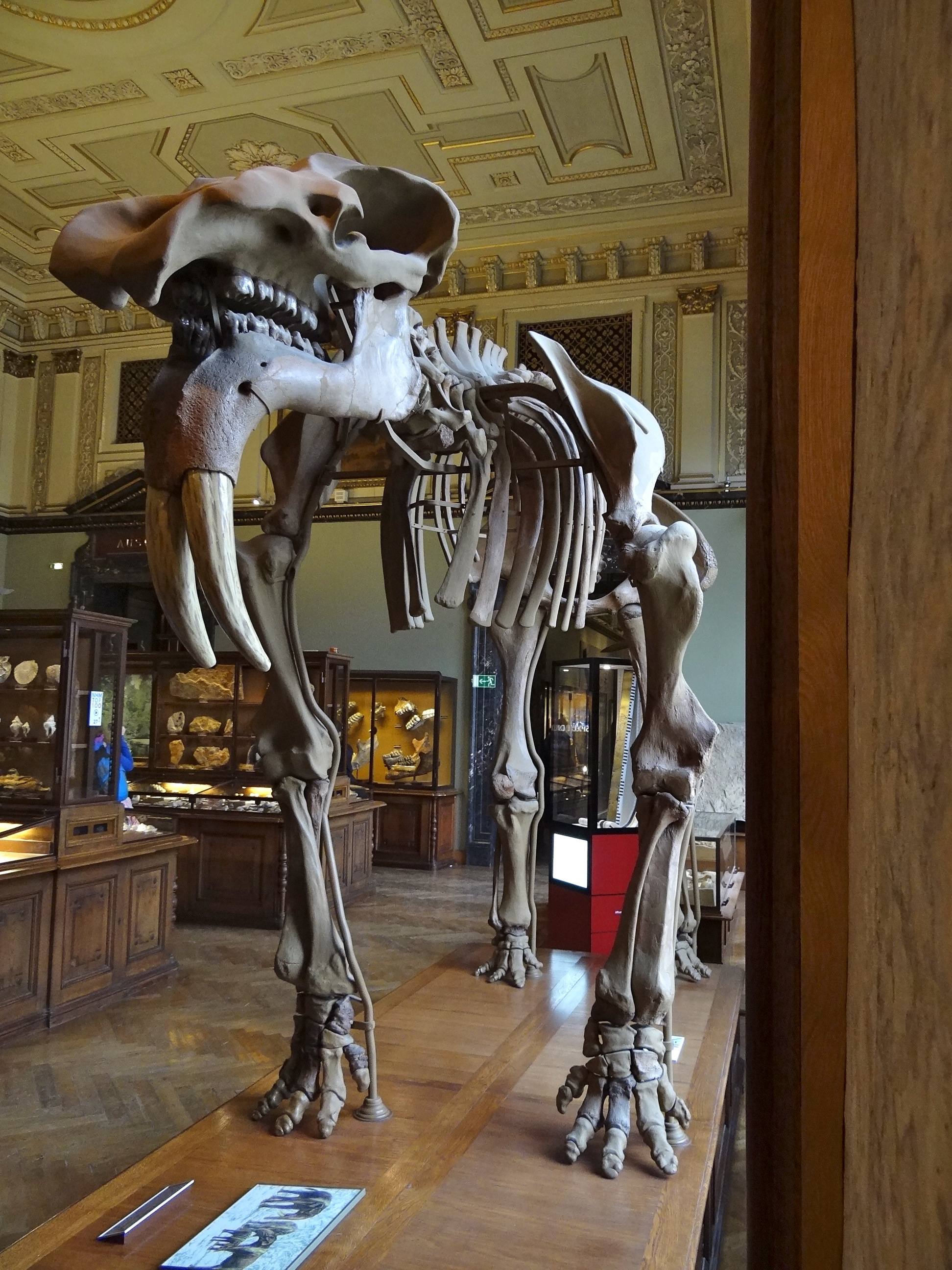 Skelett eines Hauerelfenaten